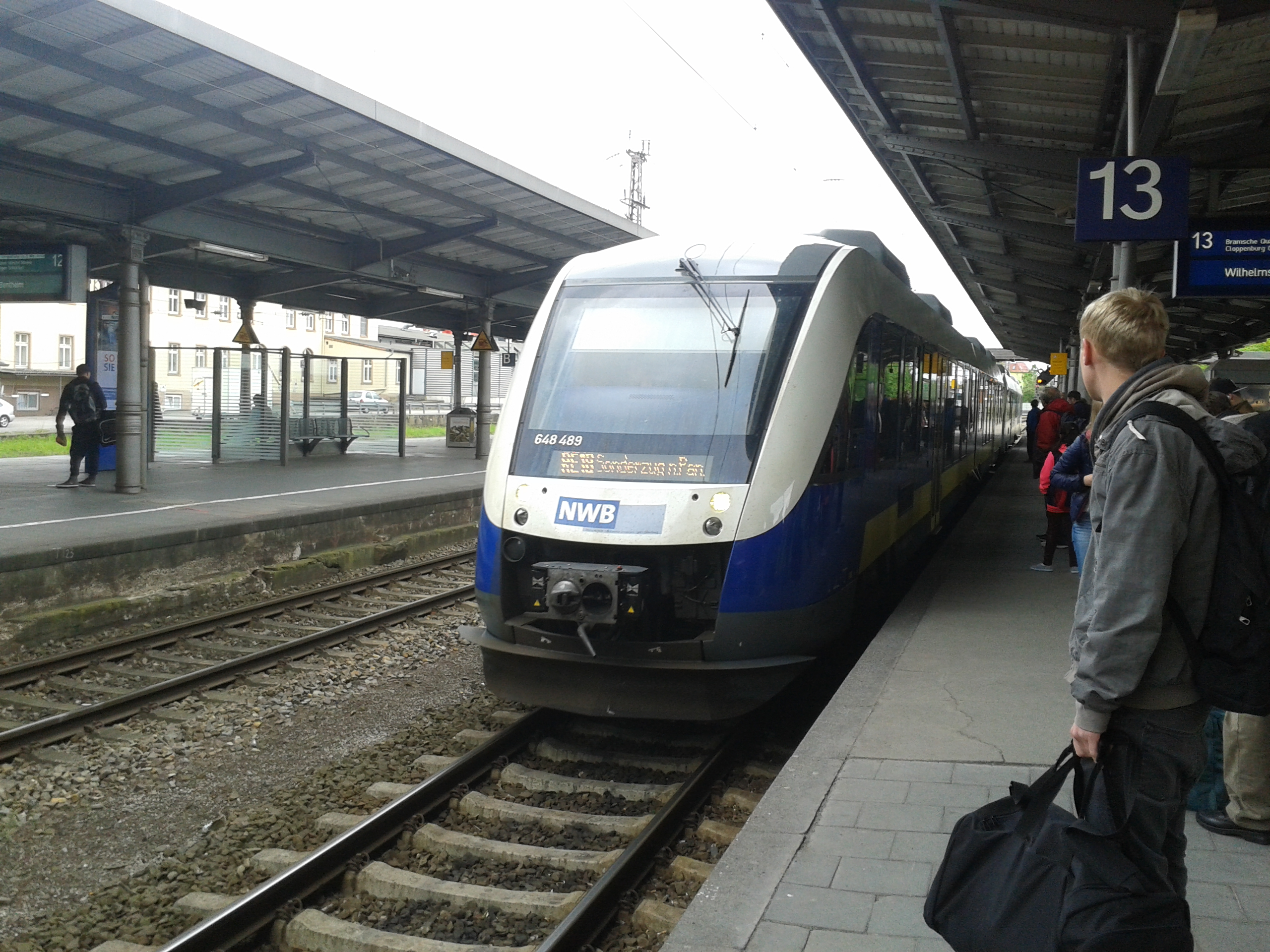 Der Regional-Express RE18 der NordWestBahn am 14. Mai 2015 um 10:51 am Bahnsteig 13 des Osnabrücker Hauptbahnhofs. Abfahrt: 11:01 Uhr.